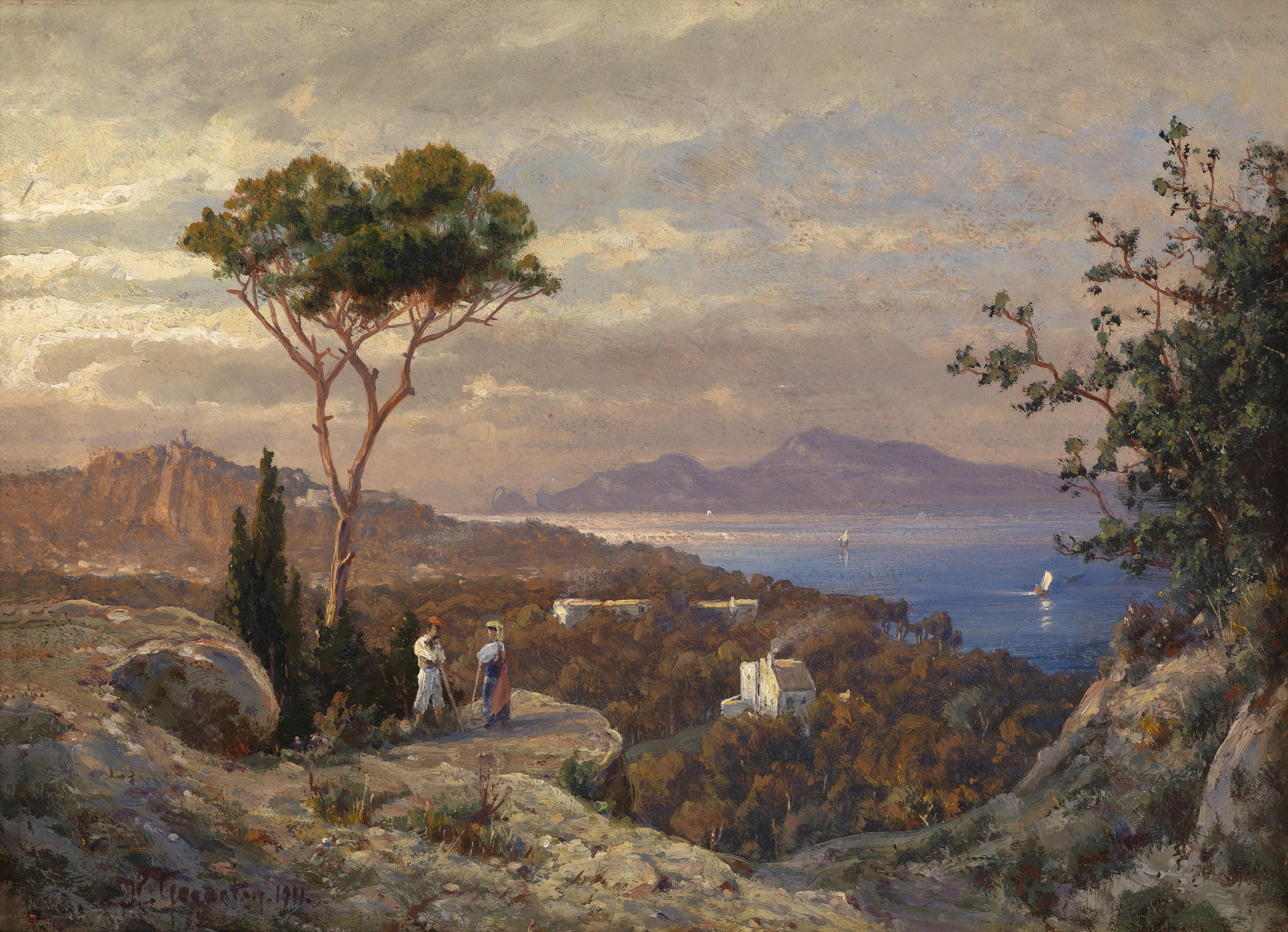 Südliche Ansicht, signiert und datiert H. Gogarten, 1911, Öl auf Karton, 23,5 x 31 cm